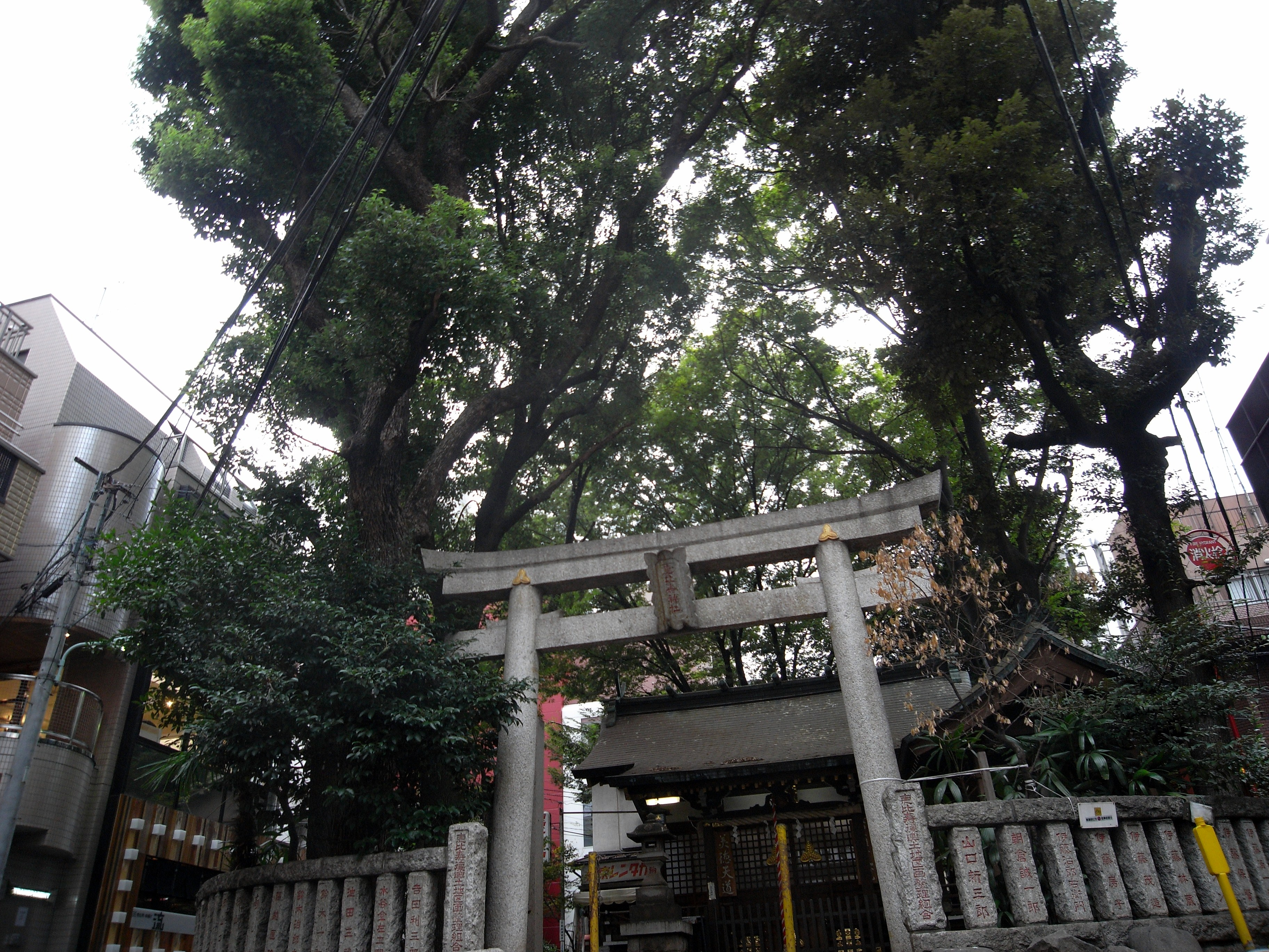 恵比寿神社（東京・渋谷区恵比寿西1-11、恵比寿駅最寄り）